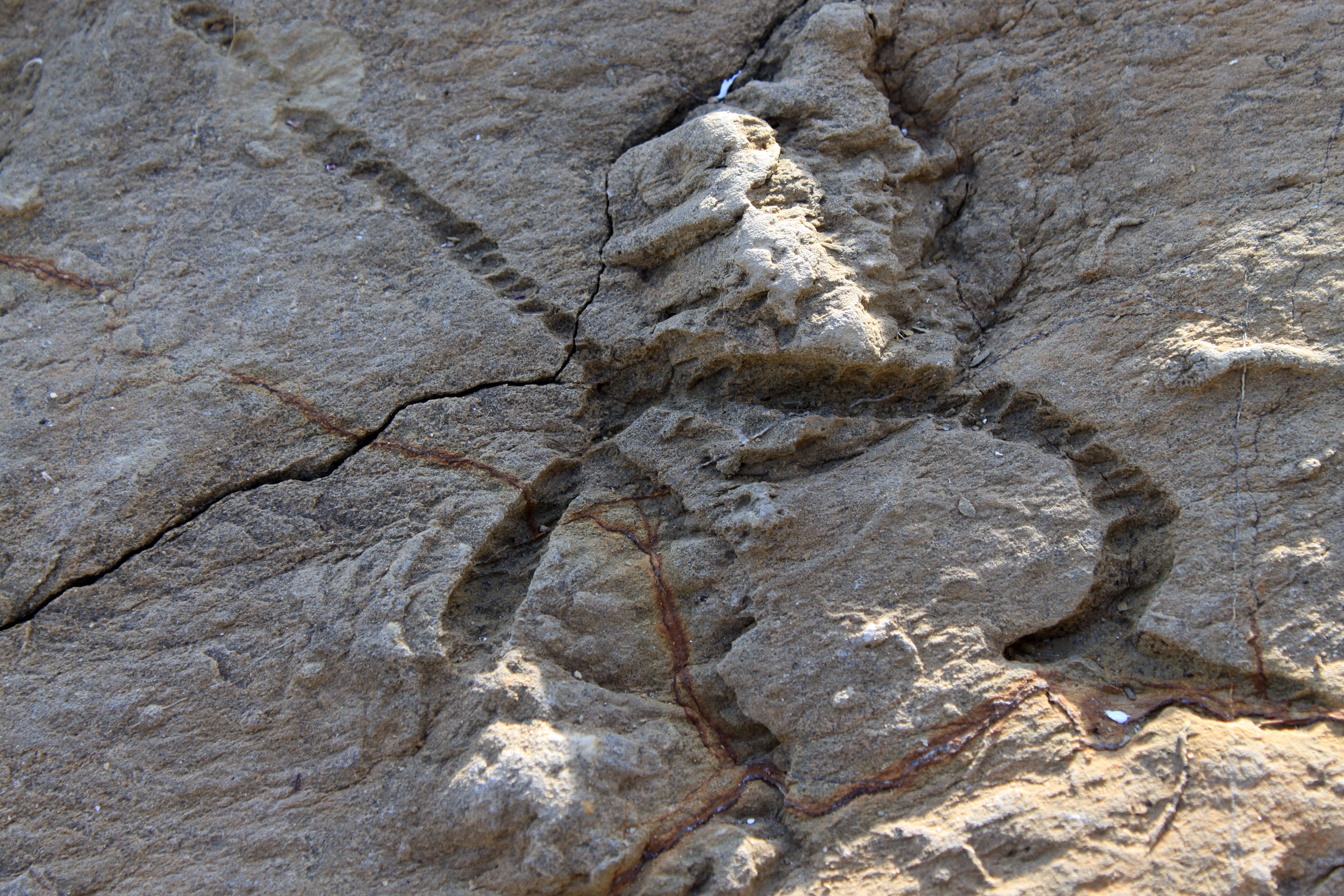 Icnofósil Neonereites uniserialis en arenisca de los flyschs de punta de San García. Complejos del Campo de Gibraltar, Unidad de Algeciras (Oligoceno-Mioceno). Algeciras, Andalucía, España.